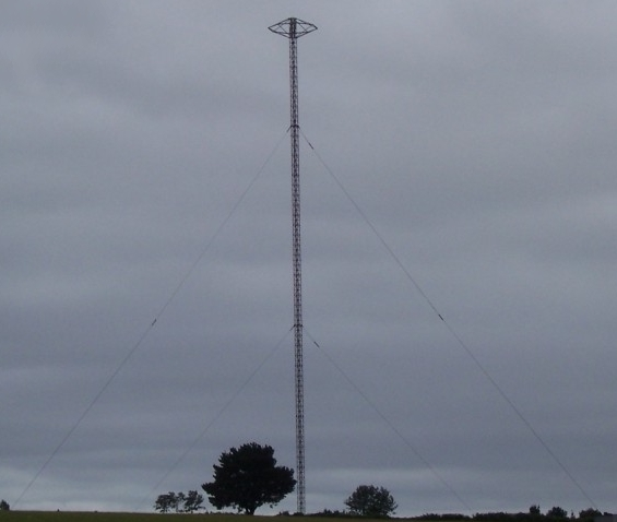 Antena central del Sonne Consol